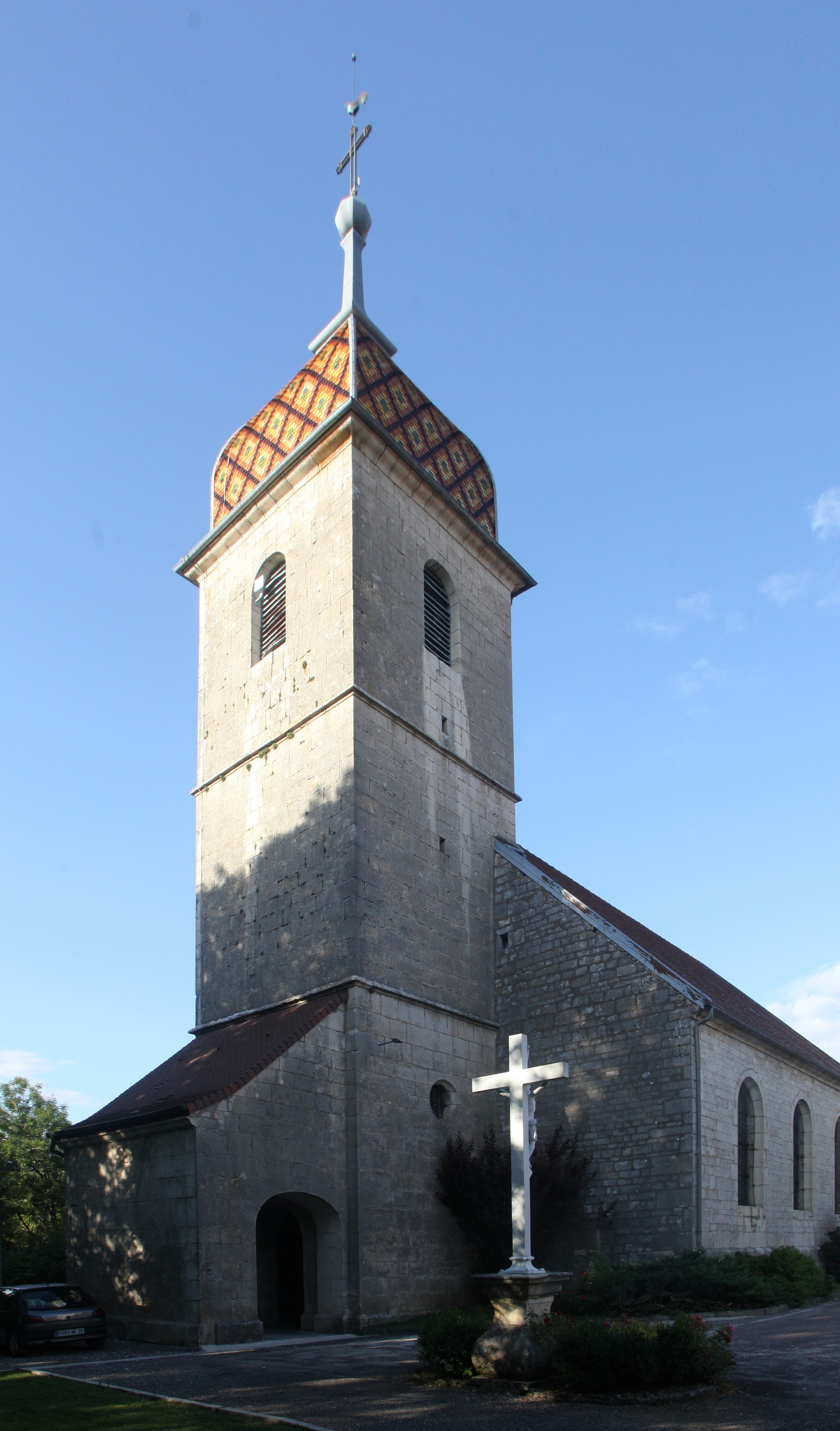 Église de Chantrans (Doubs).